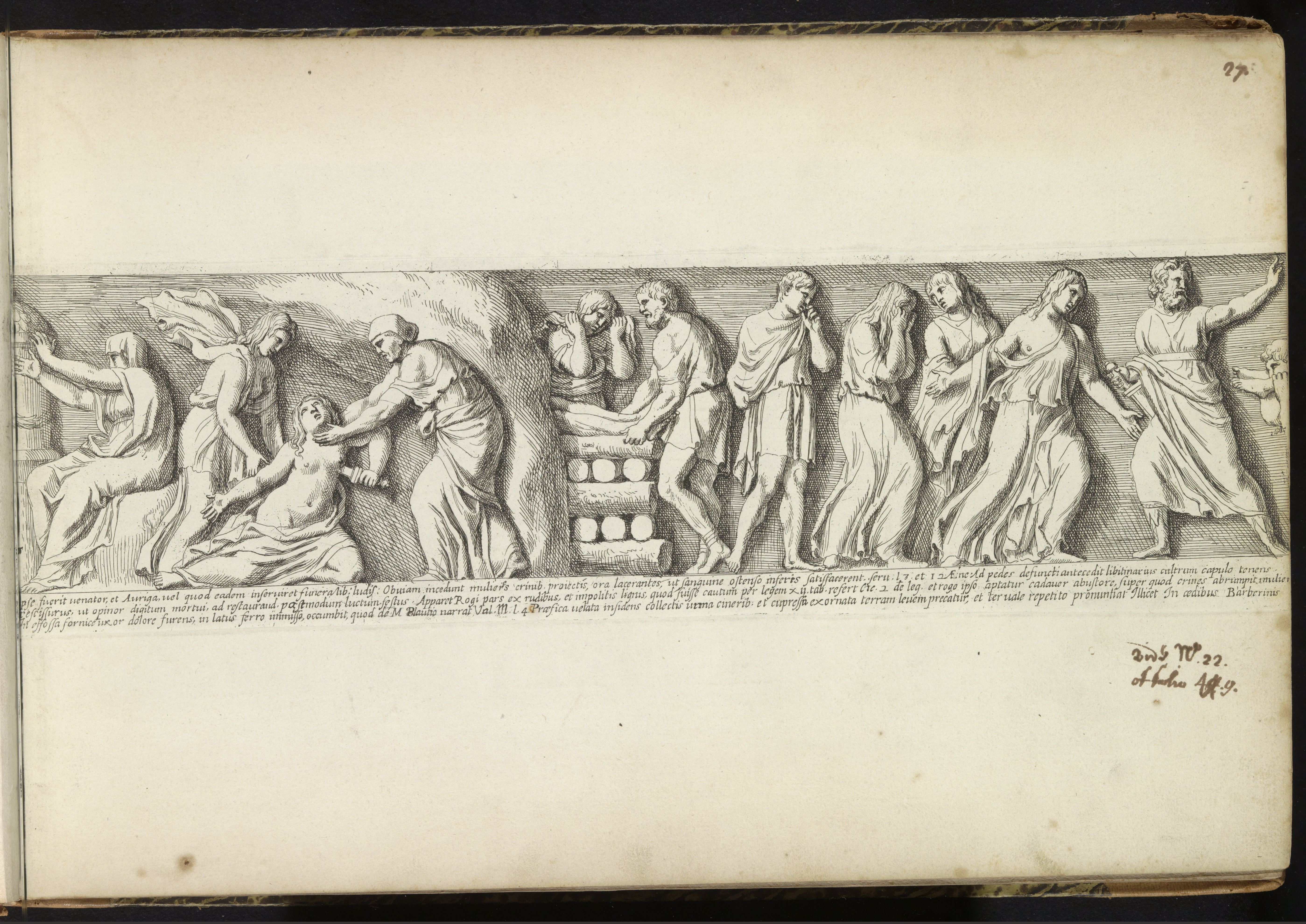 IdentificatieTitel(s): Reliëf met triomftochtRomeinse gebeeldhouwde reliëfs (serietitel)Icones et segment (...) (serietitel op object)Objecttype: prent albumblad Serienummer: 1/50Objectnummer: RP-P-2016-693-28Catalogusreferentie: LeBlanc 138-192-2(4)Opschriften / Merken: nummer, recto rechtsboven, handgeschreven in bruine inkt: ‘28’opschrift, recto rechtsonder, handgeschreven in bruine inkt: ‘Ende lib. No. 1. fol. 88. lib. No. 8. fol. 55. No. 3. lib. No. 18...’Omschrijving: Reliëf met een processie van Romeinen die de buit uit de Tempel van Jeruzalem richting een triomfboog dragen. Tekst in het Latijn in ondermarge. Prent maakt deel uit van een album.VervaardigingVervaardiger: prentmaker: François Perrier (vermeld op object)schrijver: Giovanni Pietro Bellori (vermeld op object)uitgever: weduwe François Perrierverlener van privilege: Innocentius XPlaats vervaardiging: prentmaker: Parijsuitgever: Parijsverlener van privilege: VaticaanstadDatering: 1645Materiaal: papier Techniek: etsenAfmetingen: plaatrand: h 228 mm × b 414 mmToelichtingDeze prent maakt deel uit van een reeks van 54 prenten (+ titelprent) naar antieke reliëfs. De nummering op de prenten loopt van 1 tot en met 50. Sommige prenten hebben dubbele nummers.OnderwerpWat: piece of sculpture, reproduction of a piece of sculpturetriumphal entry and public reception, pageant, 'entrée solennelle', 'joyeuse entrée'military demonstrationscarrying off the spoils of warVerwerving en rechtenCredit line: Bruikleen van de Rijksacademie van Beeldende KunstenVerwerving: bruikleen 1979Copyright: Publiek domein